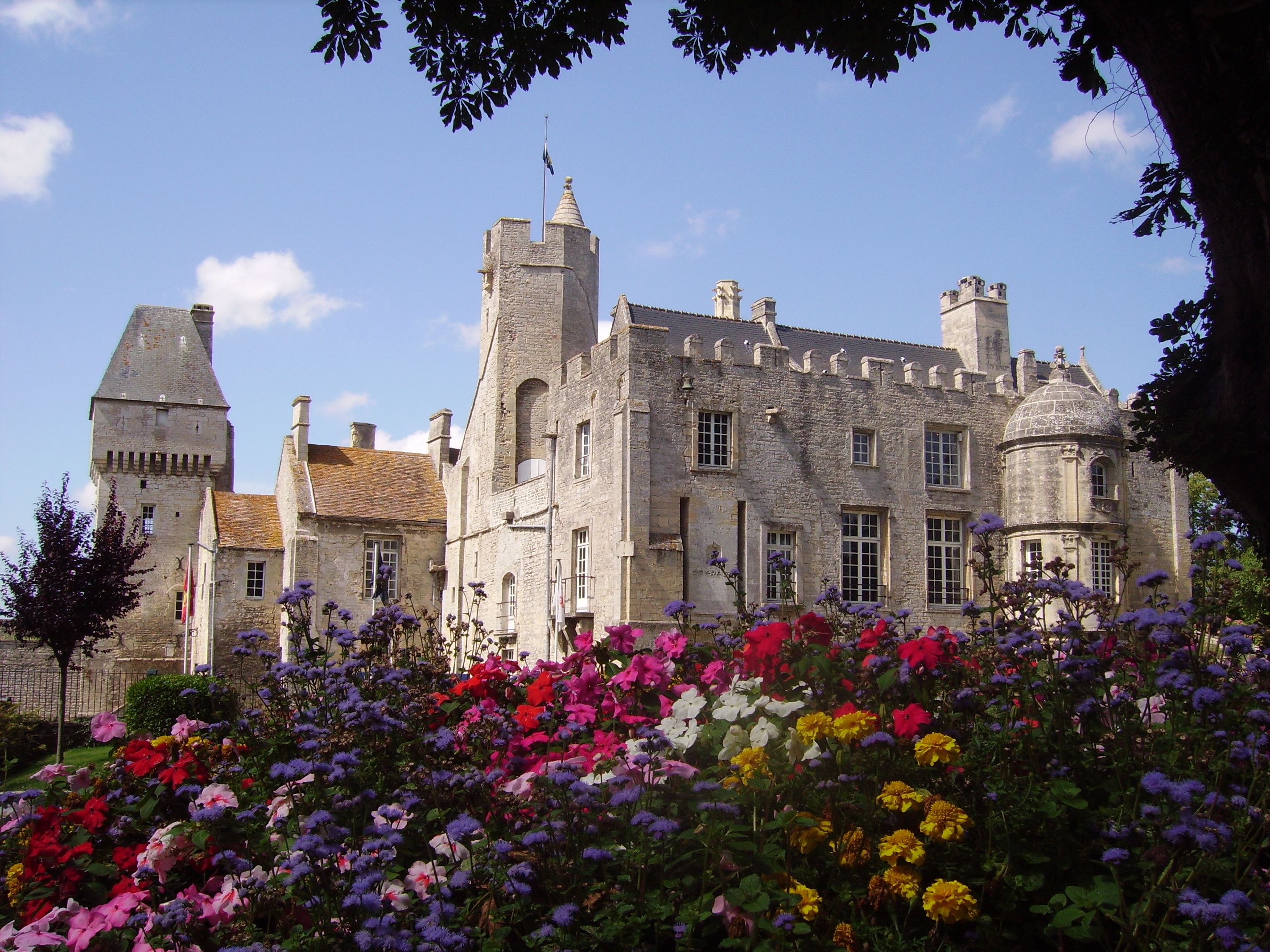 Chateau de Creully